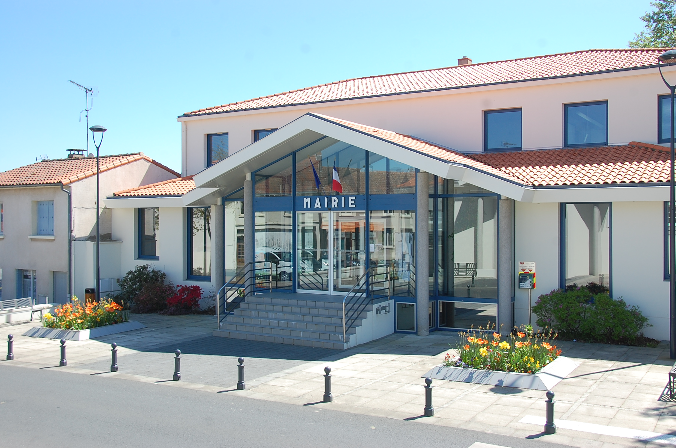 La mairie de La Tessoualle (Maine-et-Loire, France).